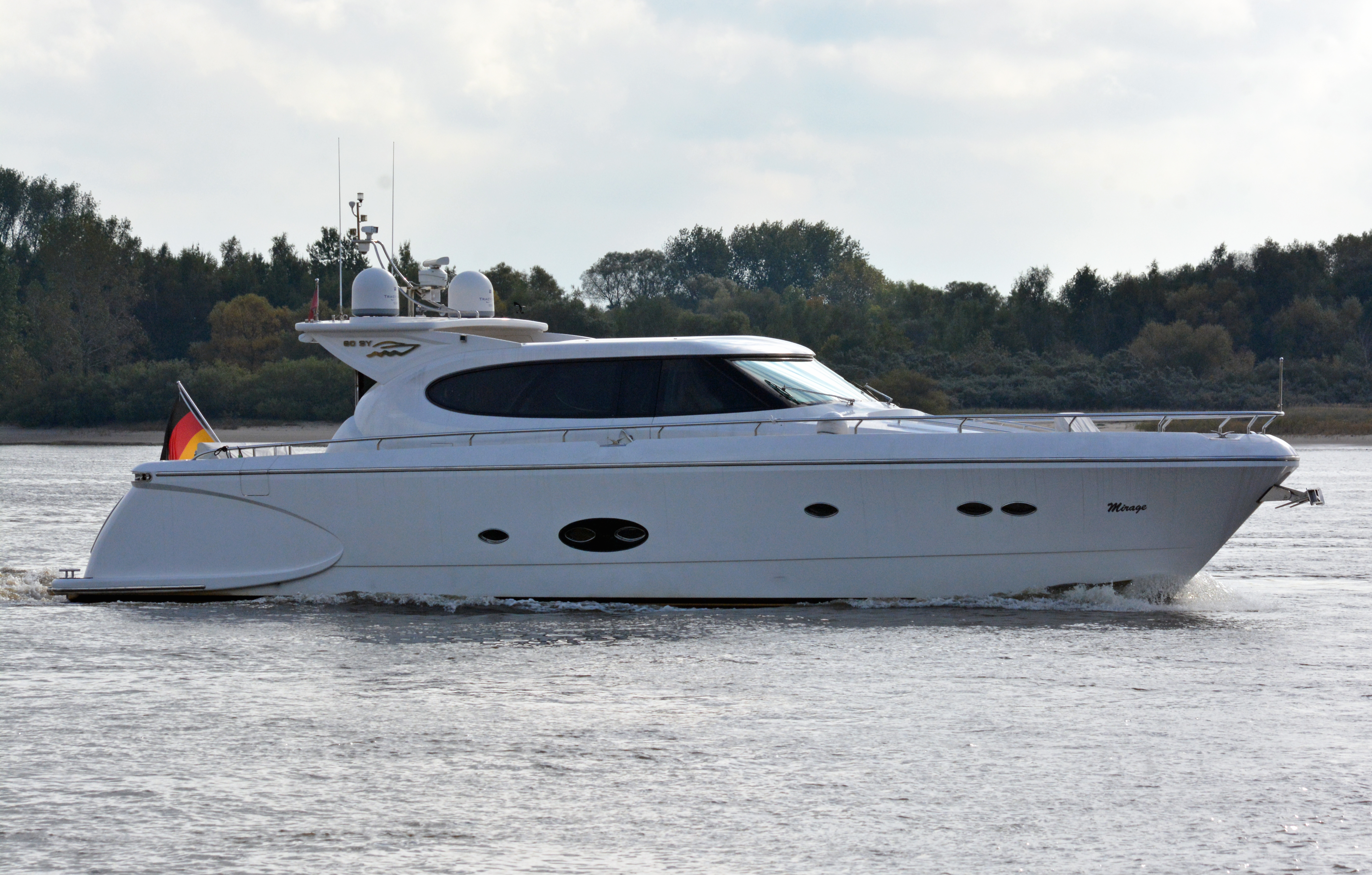 Die Motor Yacht Mirage auf der Elbe bei Wedel Type: Horizon Yacht E 60 SY Länge: 19,02 Breite: 5,36 Tiefgang: 1,35